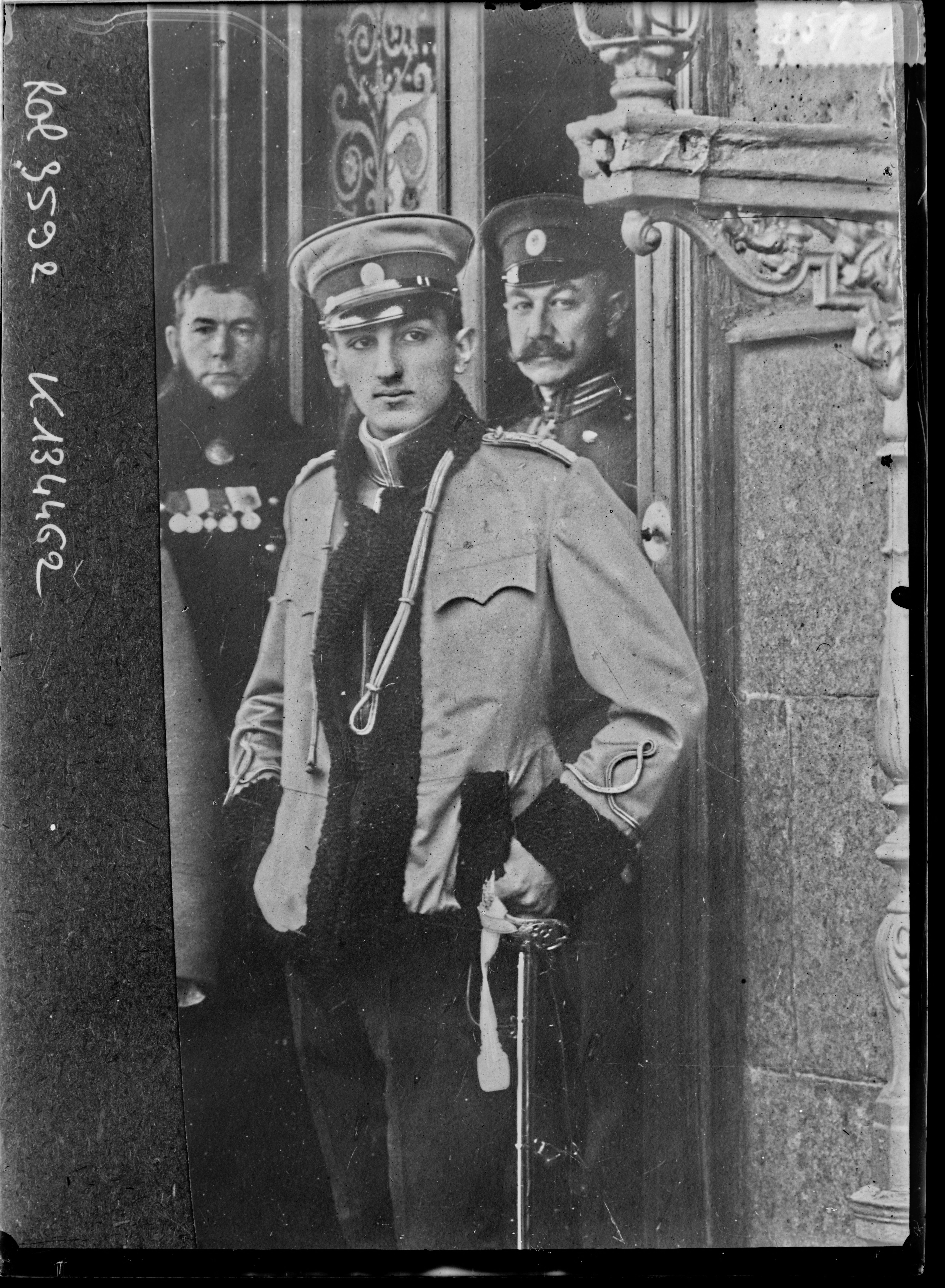 Престолонаследник Георгий Карагеоргиевич в Петербурге. 1908 год.